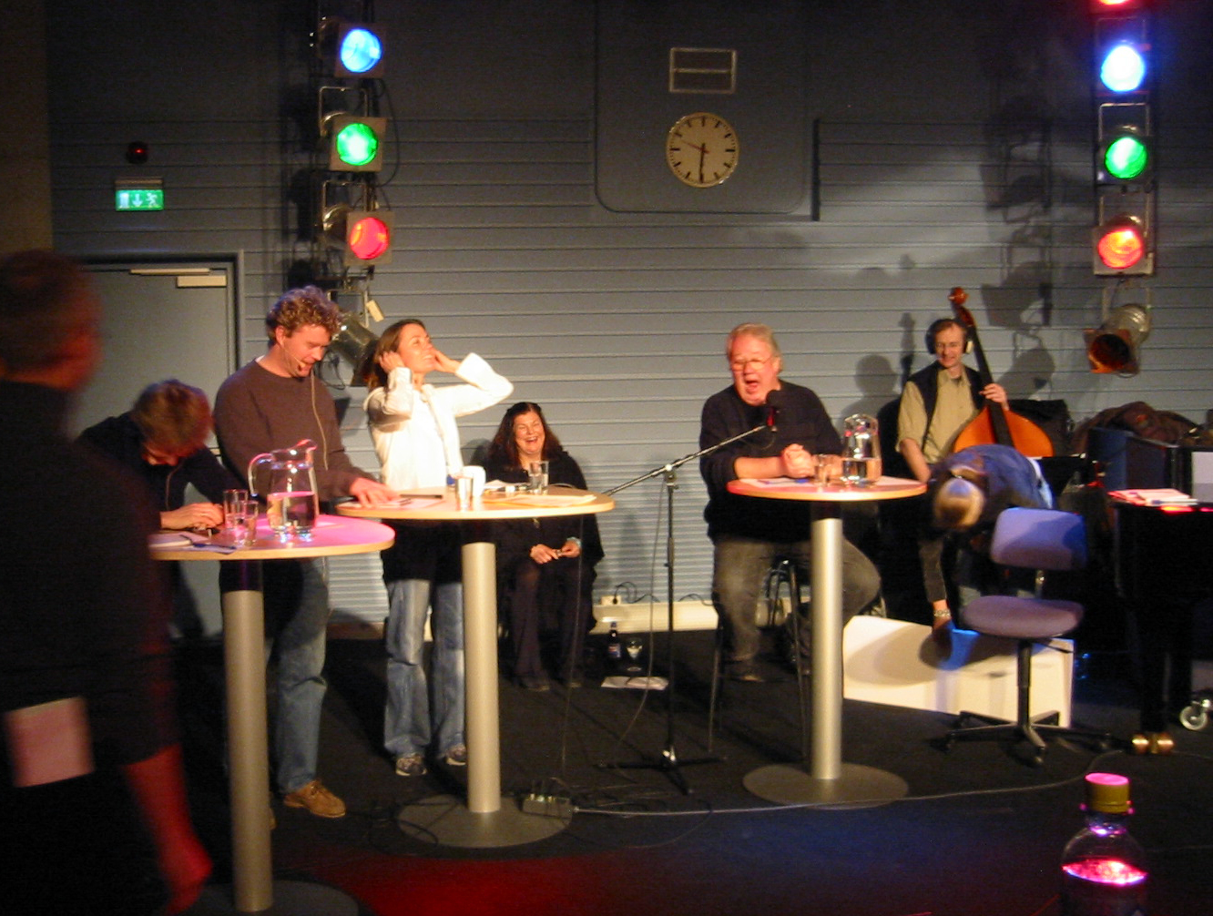 Fra innspillingen av 20 spørsmål i Studio 19 på NRK Marienlyst